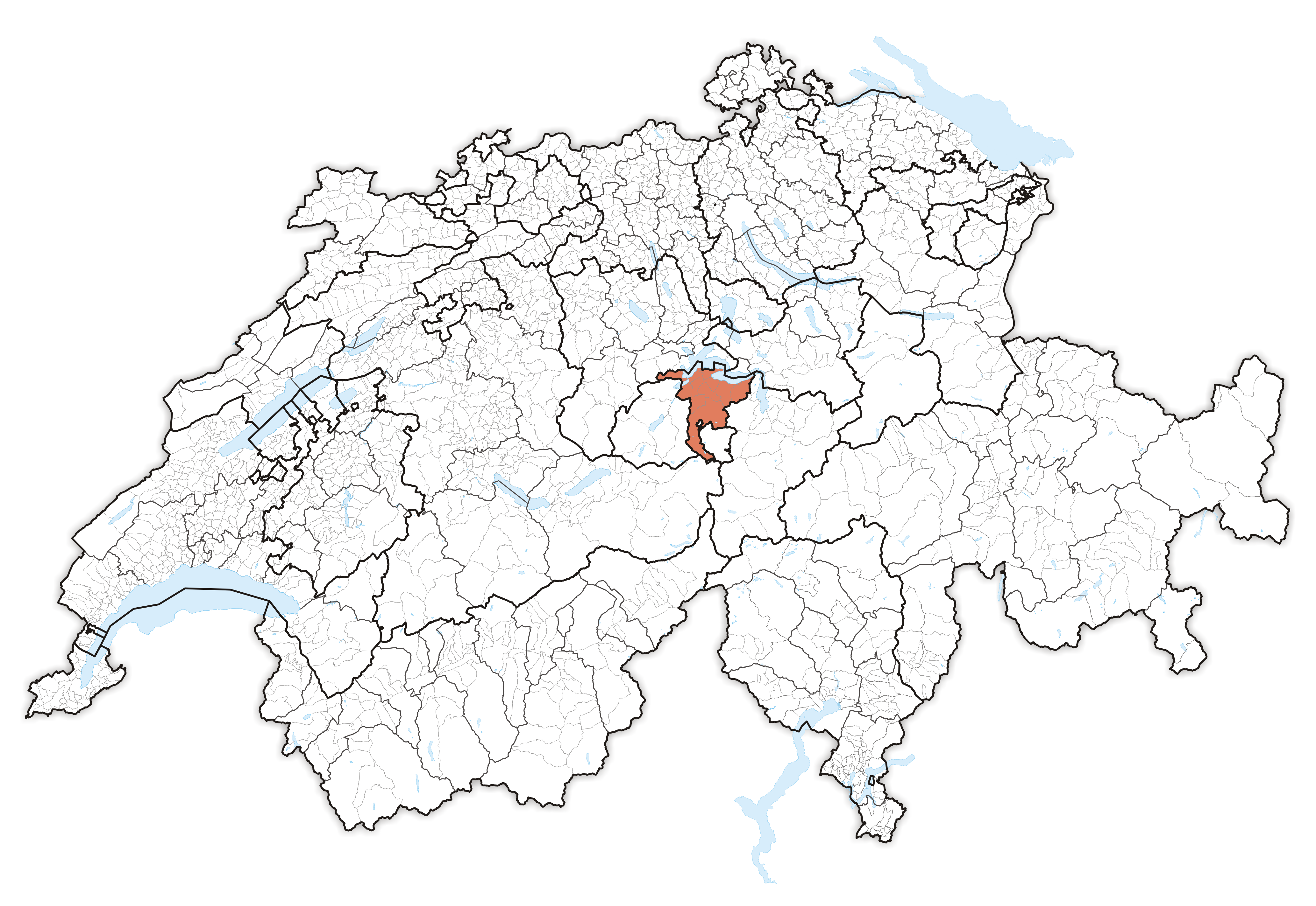 Canton Nidwalden